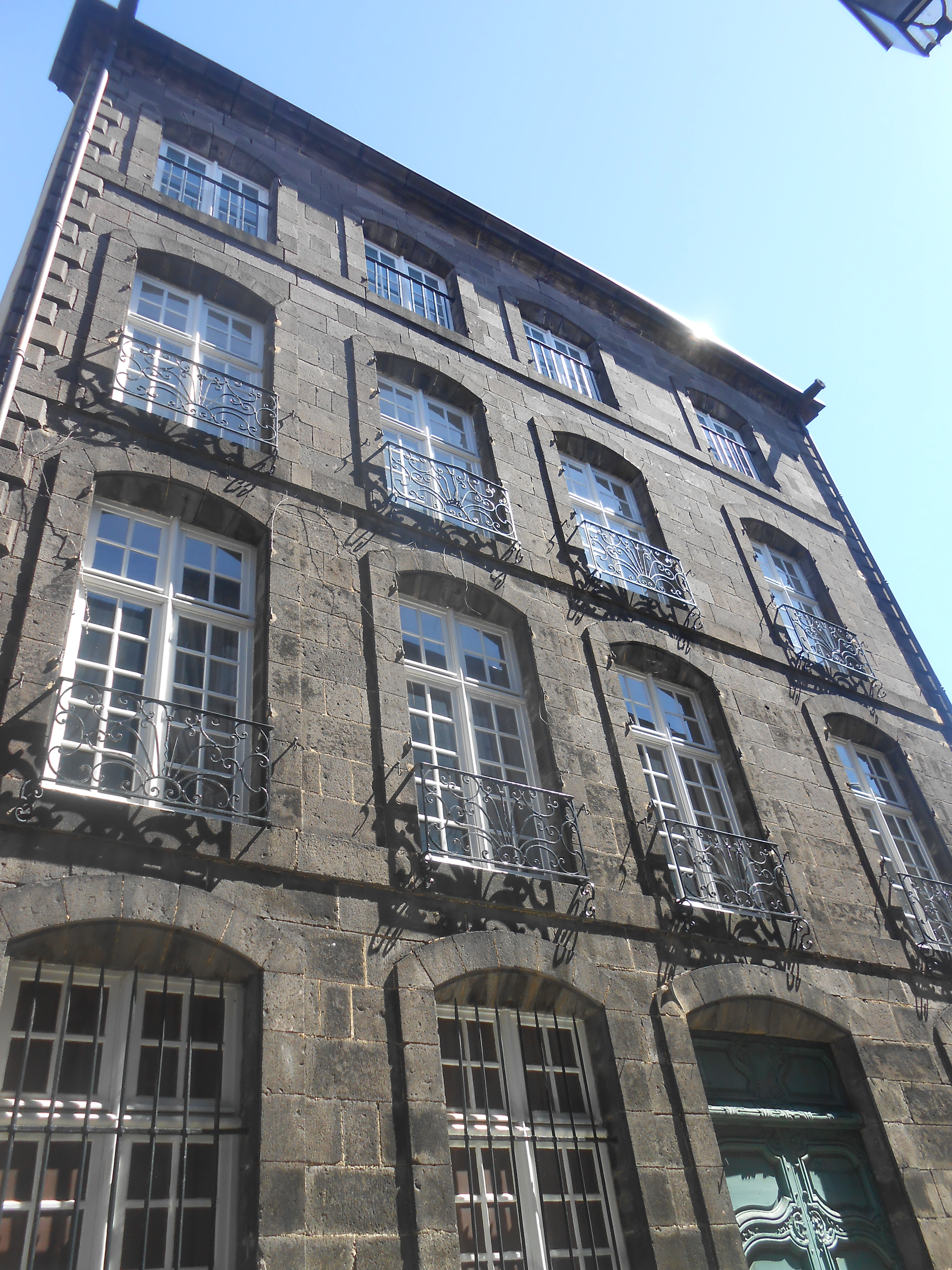 Hôtel Desaix, un des deux hôtels particuliers qui constituent actuellement le Musée Mandet.